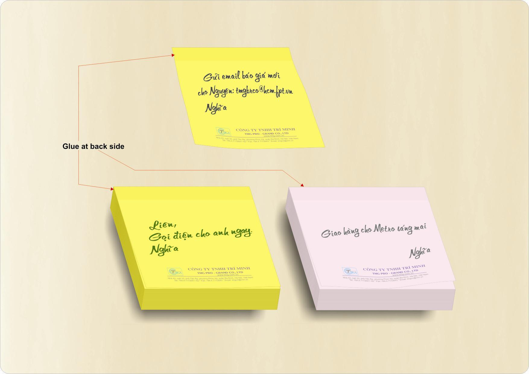 Giấy ghi việc in sẵn-Preprinted Post it notes